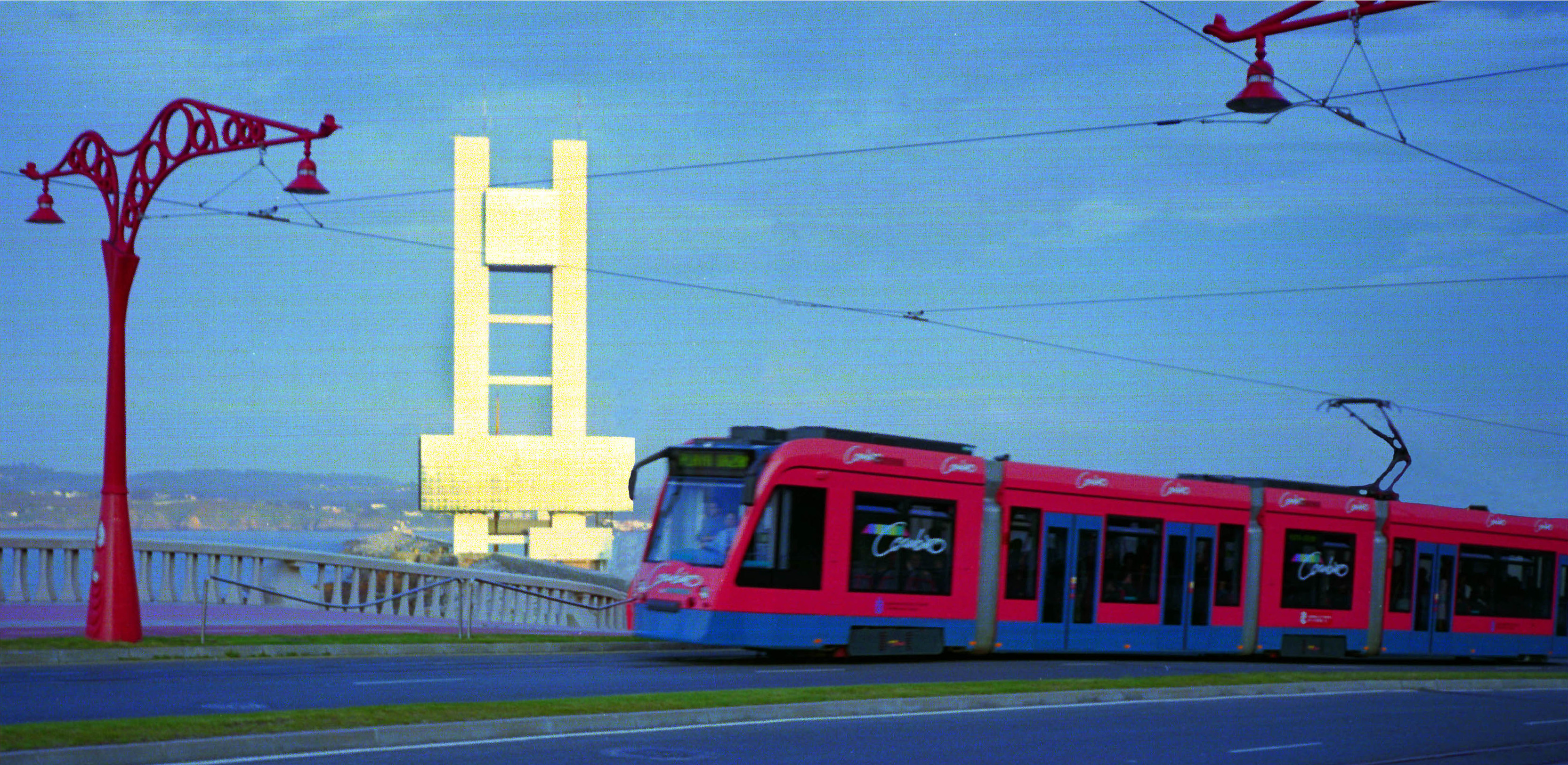 Antigua foto del futuro